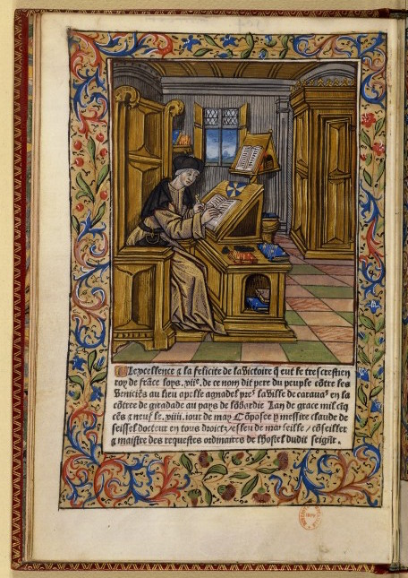 Ouvrage imprimé par Antoine Vérard sur vélins et coloré.